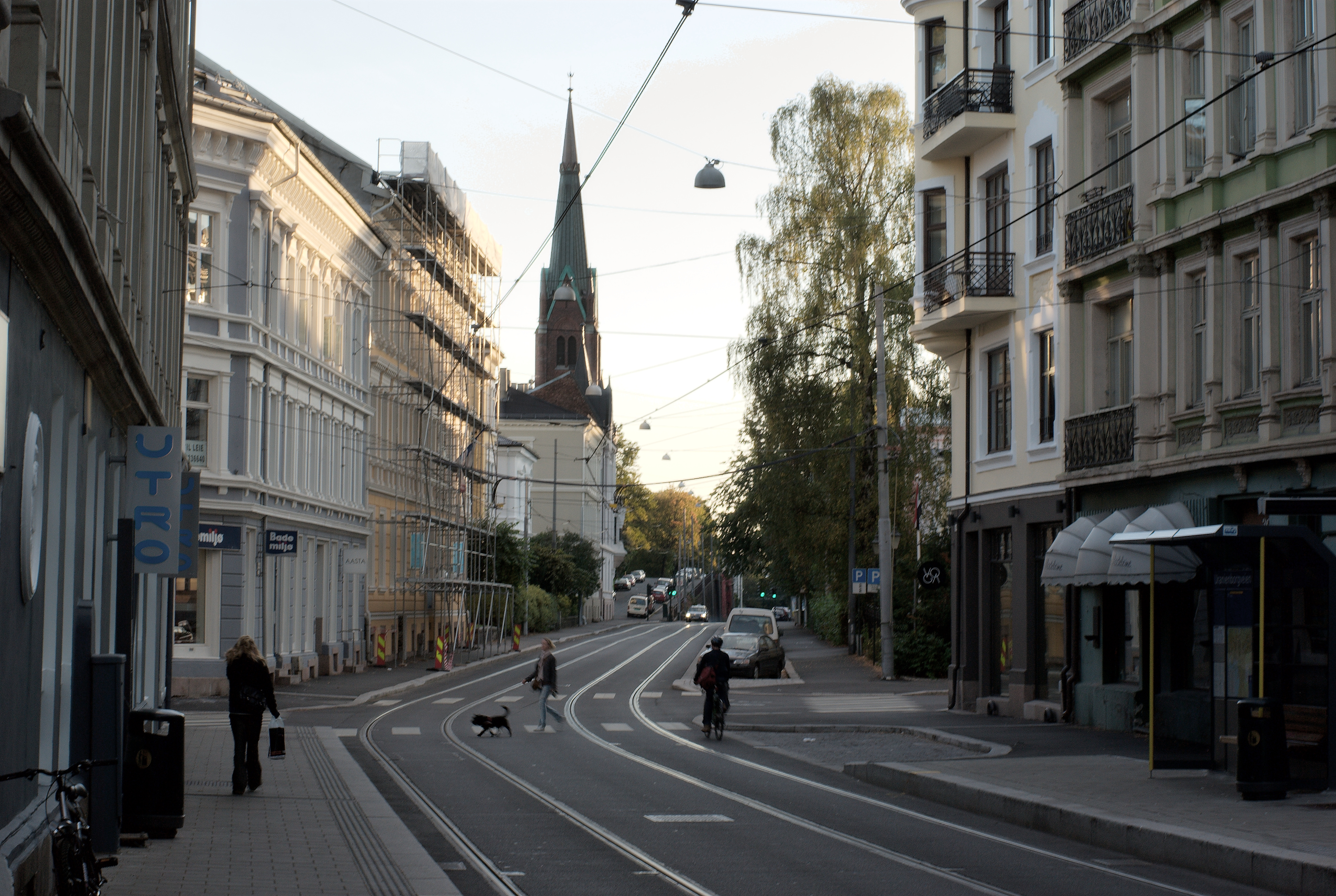 Holtegata in Oslo.